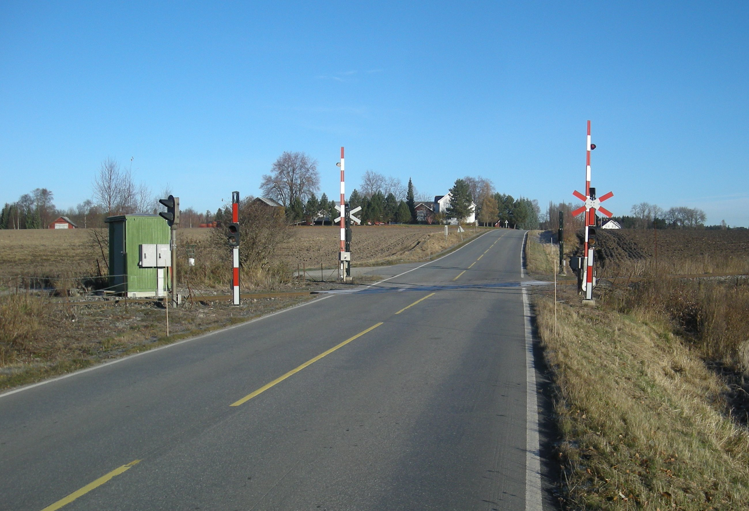 Hørsand planovergang, der fylkesvei 231 krysser Rørosbanen